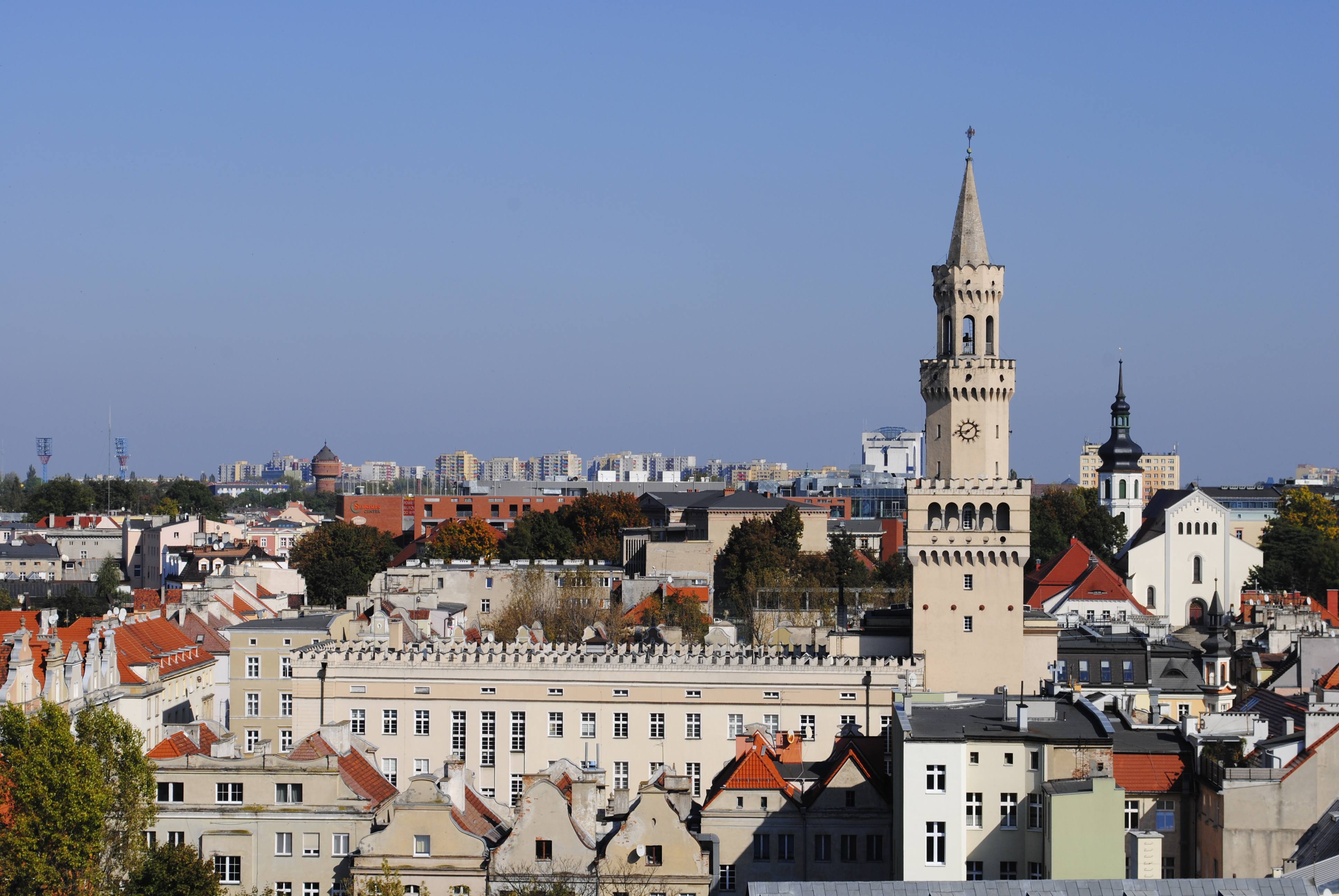 Rathaus Opole